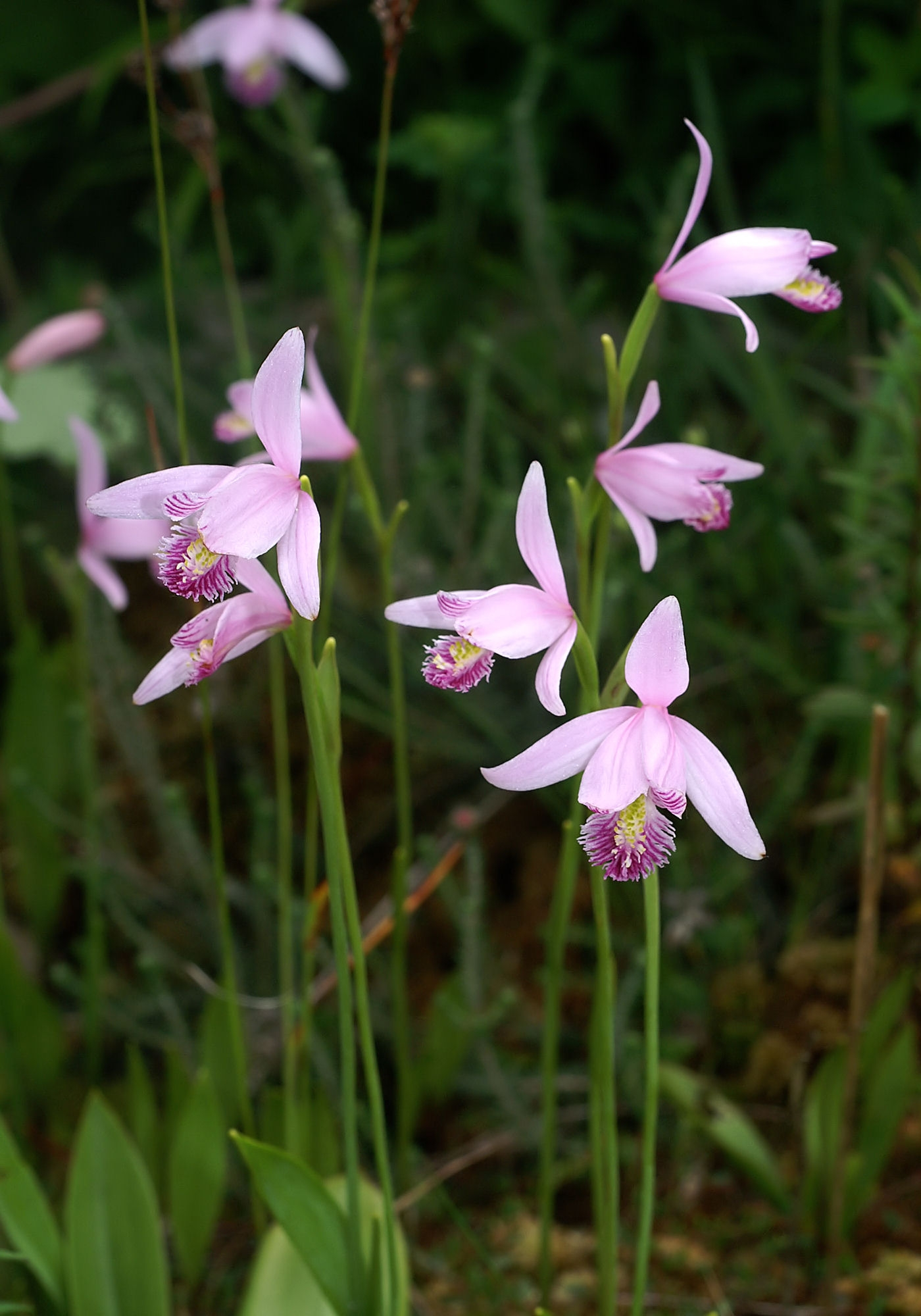 Pogonia ophioglossoides - plant